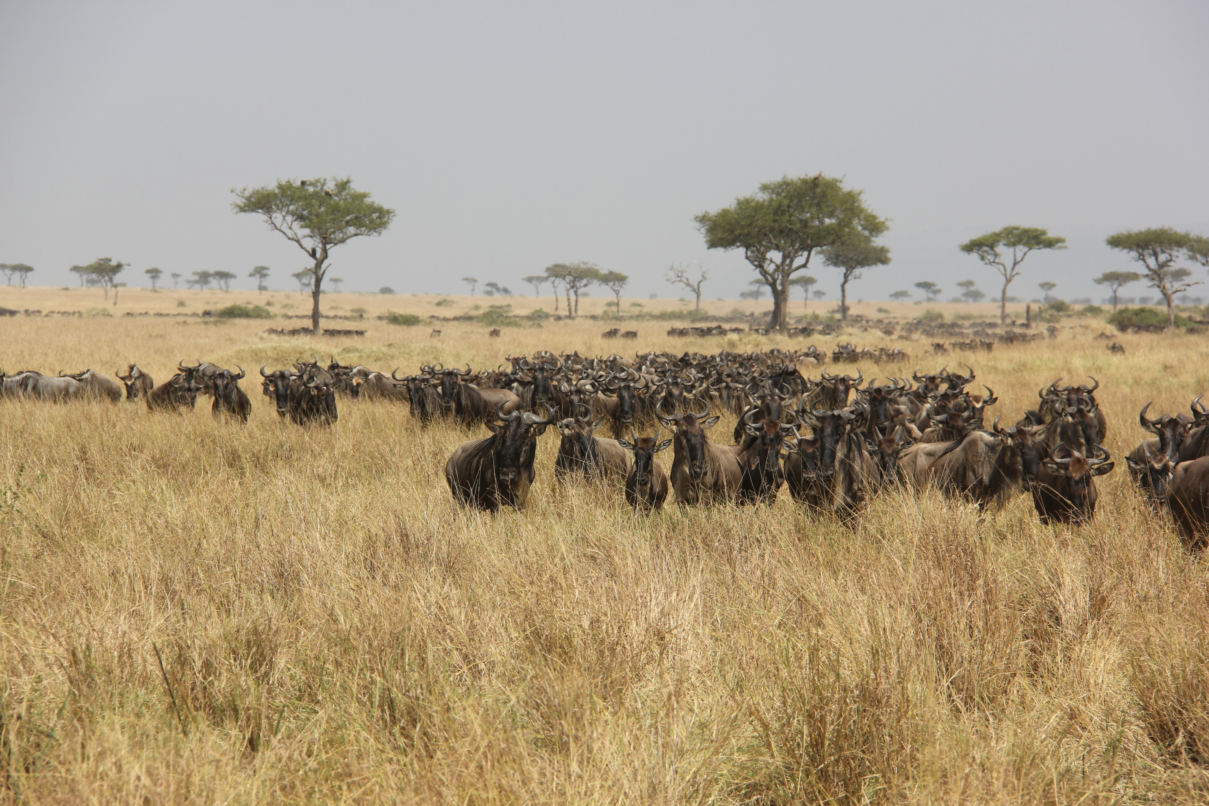 Mara Triangle